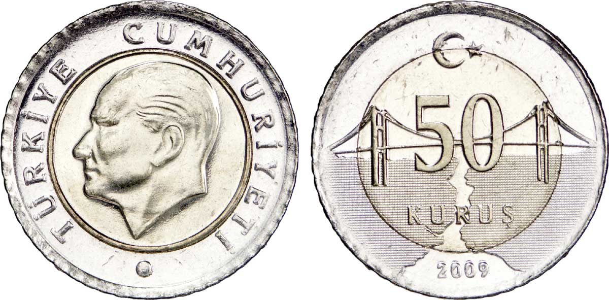 Turquie, 50 Kuruş à l'effigie de Kemal Atatürk, 2009